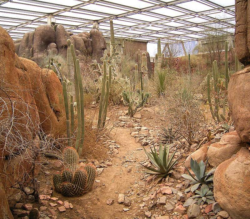 Burgers Zoo, NL